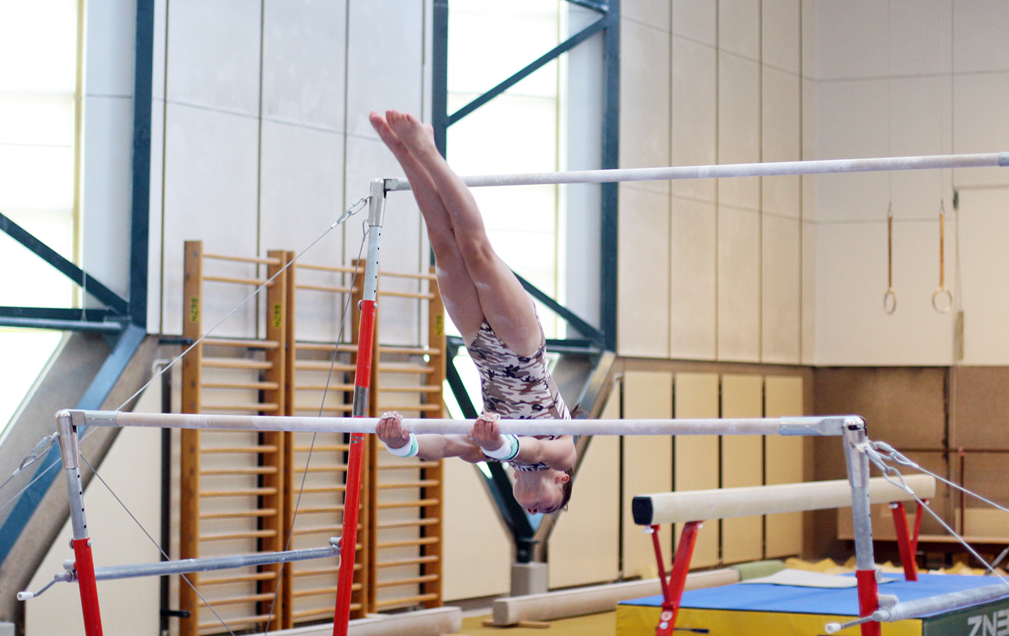 Kunstturnerin am Stufenbarren in der Gerätturnhalle des Landessportzentrums in Dornbirn.